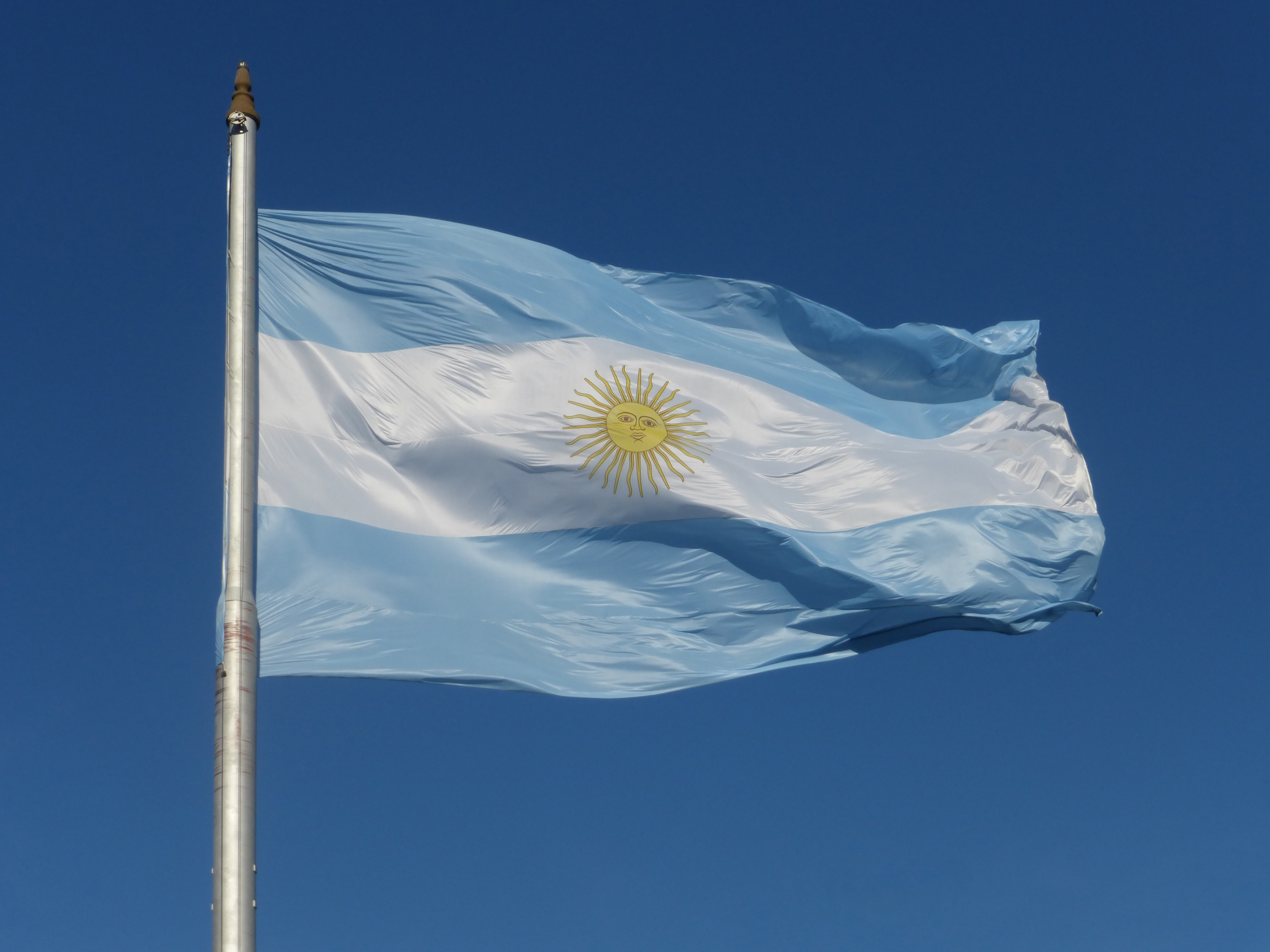 Bandera de la República Argentina ondeando en el mástil ubicado a un costado de la Casa Rosada.